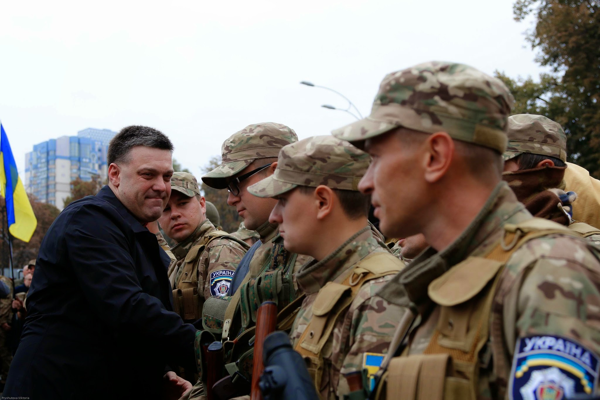 «Сичь» II группа отправляется на восток